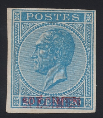 Timbre de Belgique à l'effigie de Léopold I. L'exemplaire scanné est surchargé SPECIMEN en rouge , non dentelé, moins rare que le vrai dentelé, émis le 1er janvier 1866. Le timbre émis porte le n°18 dans le Catalogue de timbres-poste de Belgique (COB).